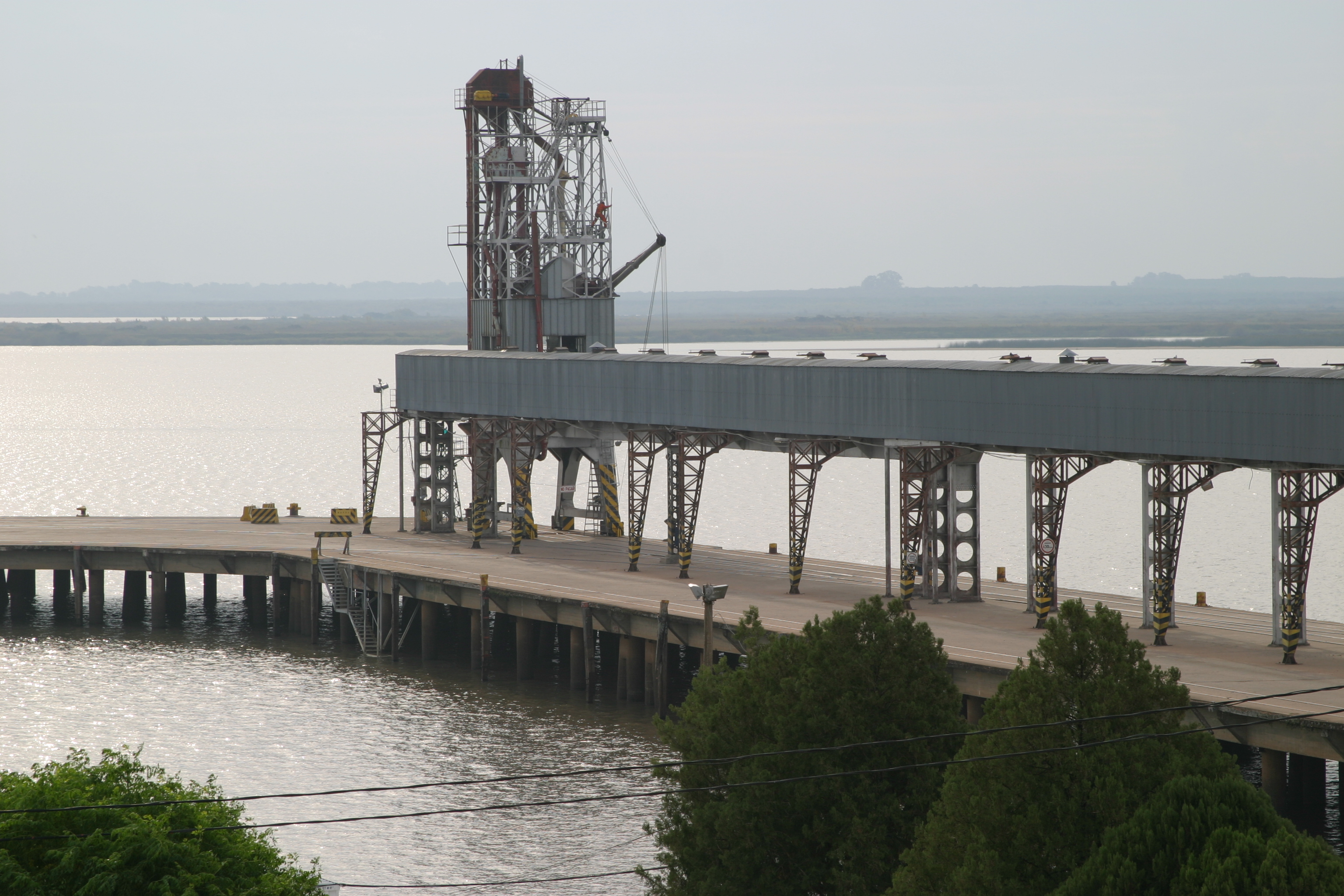 Muelle de Nueva Palmira, Uruguay